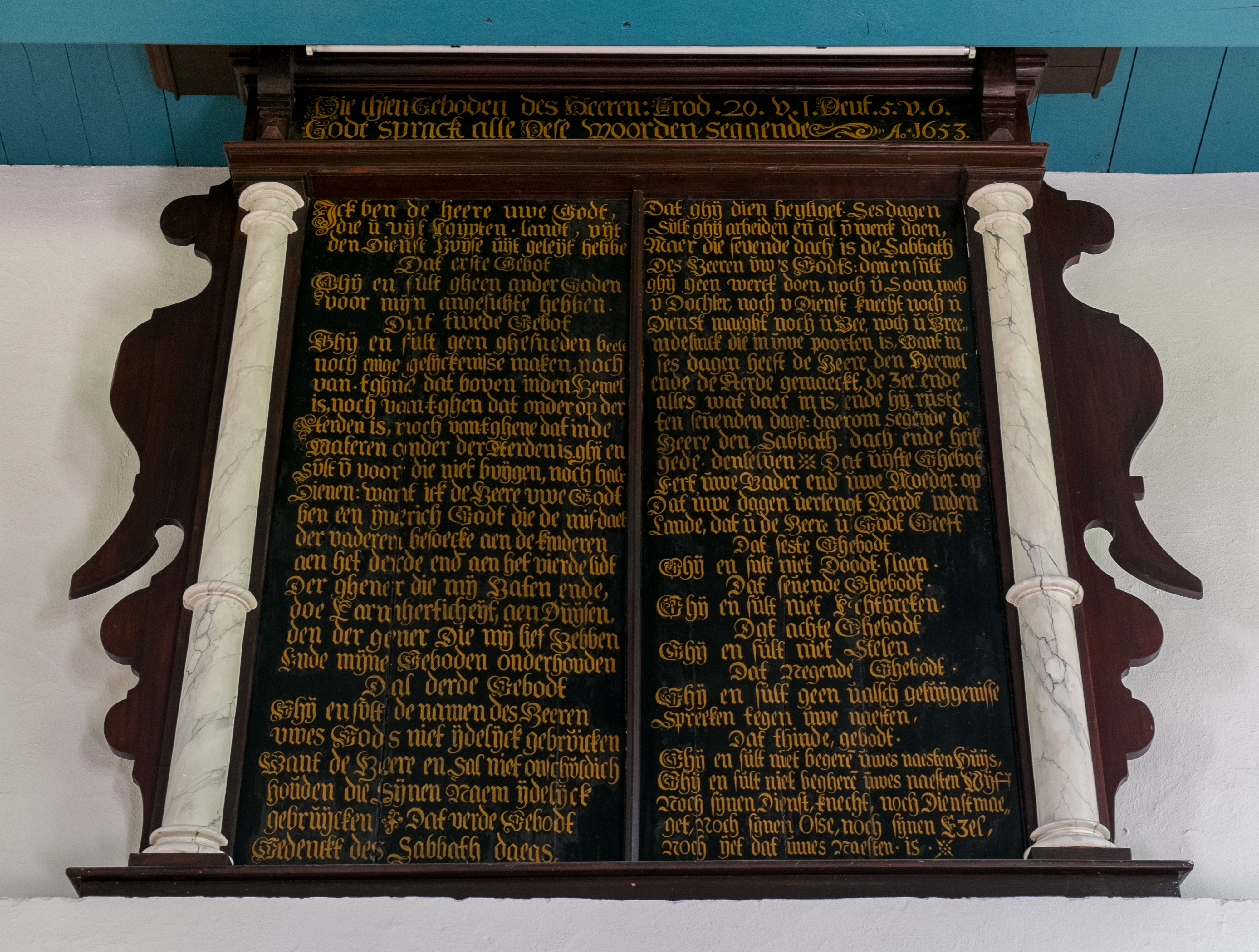 tiengebodenbord in de kerk van Leegkerk